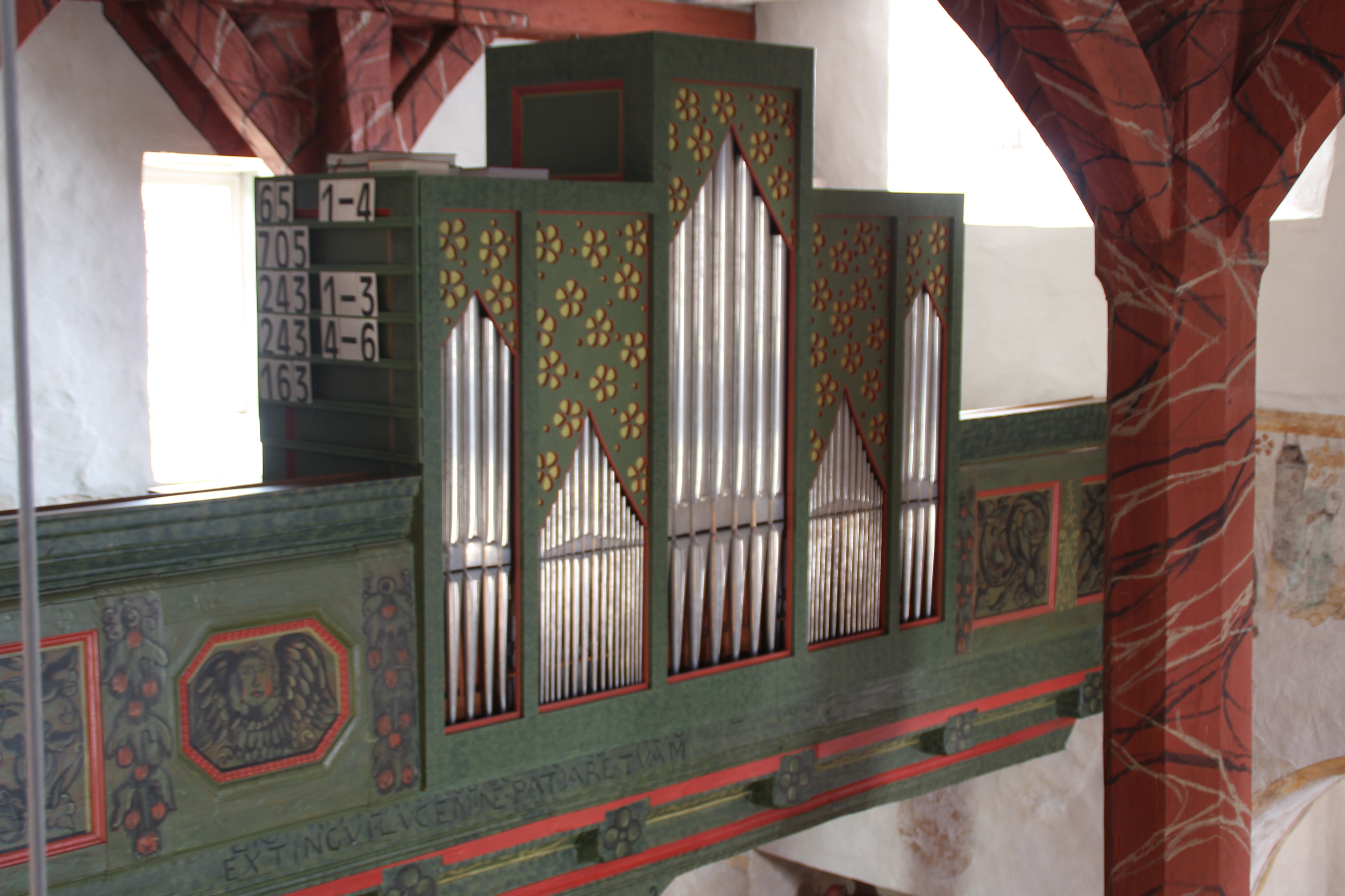 Orgel der Evangelischen Kirche Frankenbach, Gemeinde Biebertal, Landkreis Gießen, Hessen, Deutschland